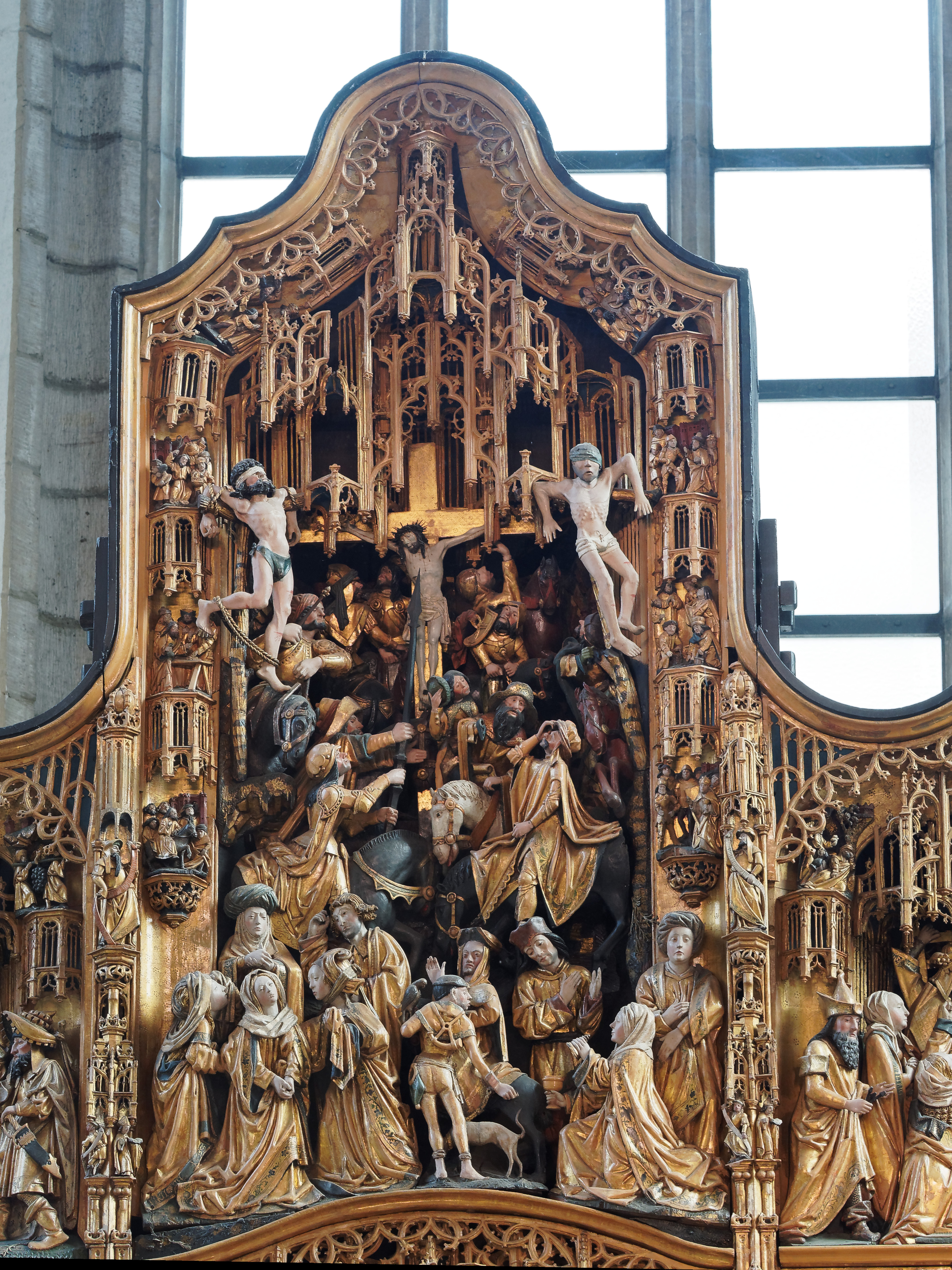 Detail (Mitte) des Antwerpener Retabel in der Petrikirche in Dortmund (Goldenes Wunder von Westfalen) eine fünfflügelige Anlage von 7,4 m Breite. (Das Foto ist eine Montage aus drei Fotos von unterschiedlichem Standpunkt zur weitgehenden Vermeidung von Fensterpiegelungen auf der Glasfront.)